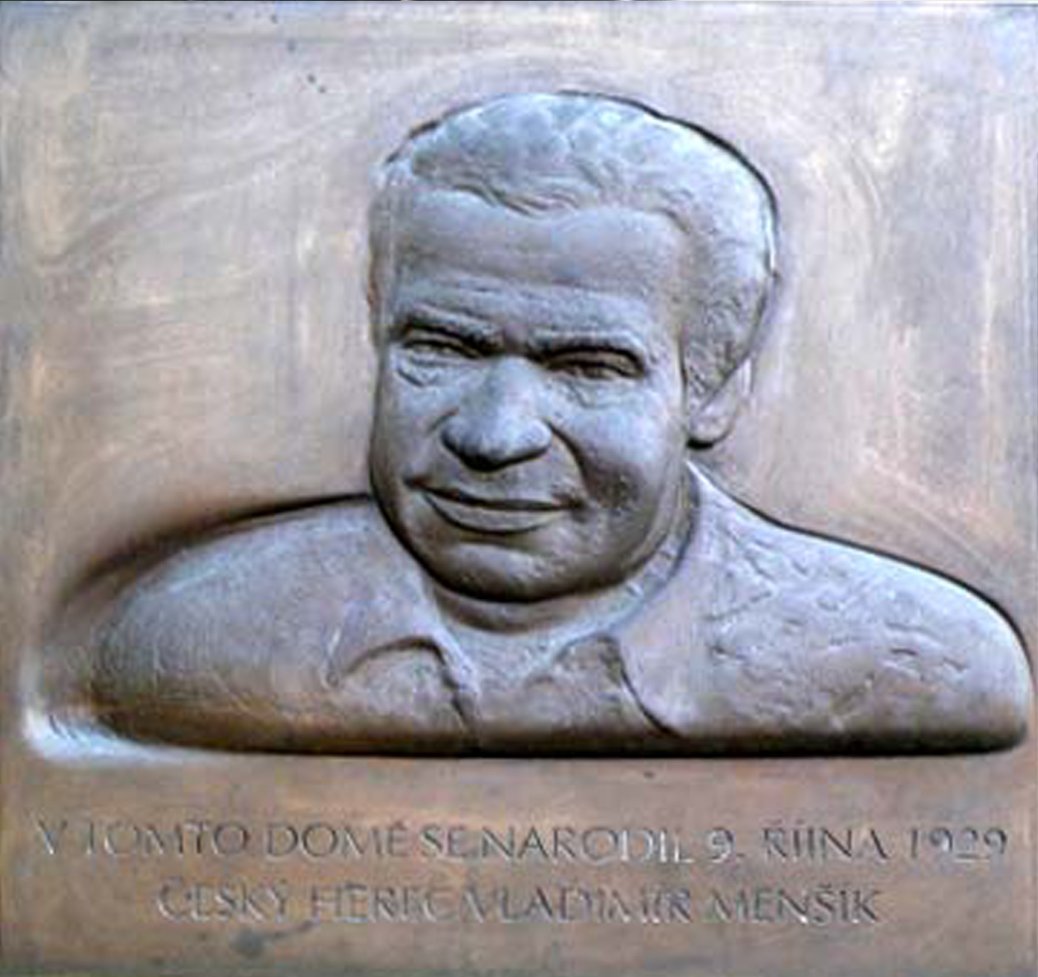 Pamětní deska Vladimíra Menšíka na domku v Ivančicích.